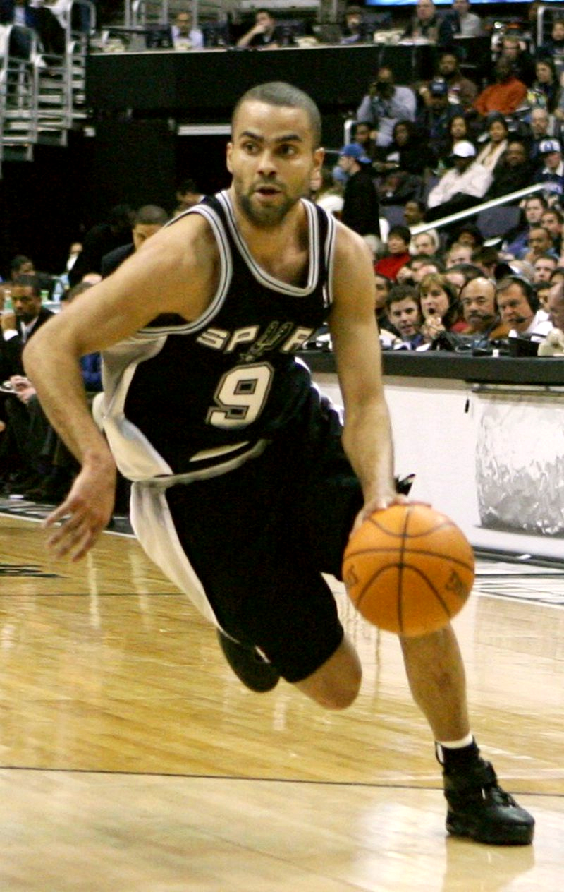 טוני פארקר, שזכה בפרס בשנת 2007.